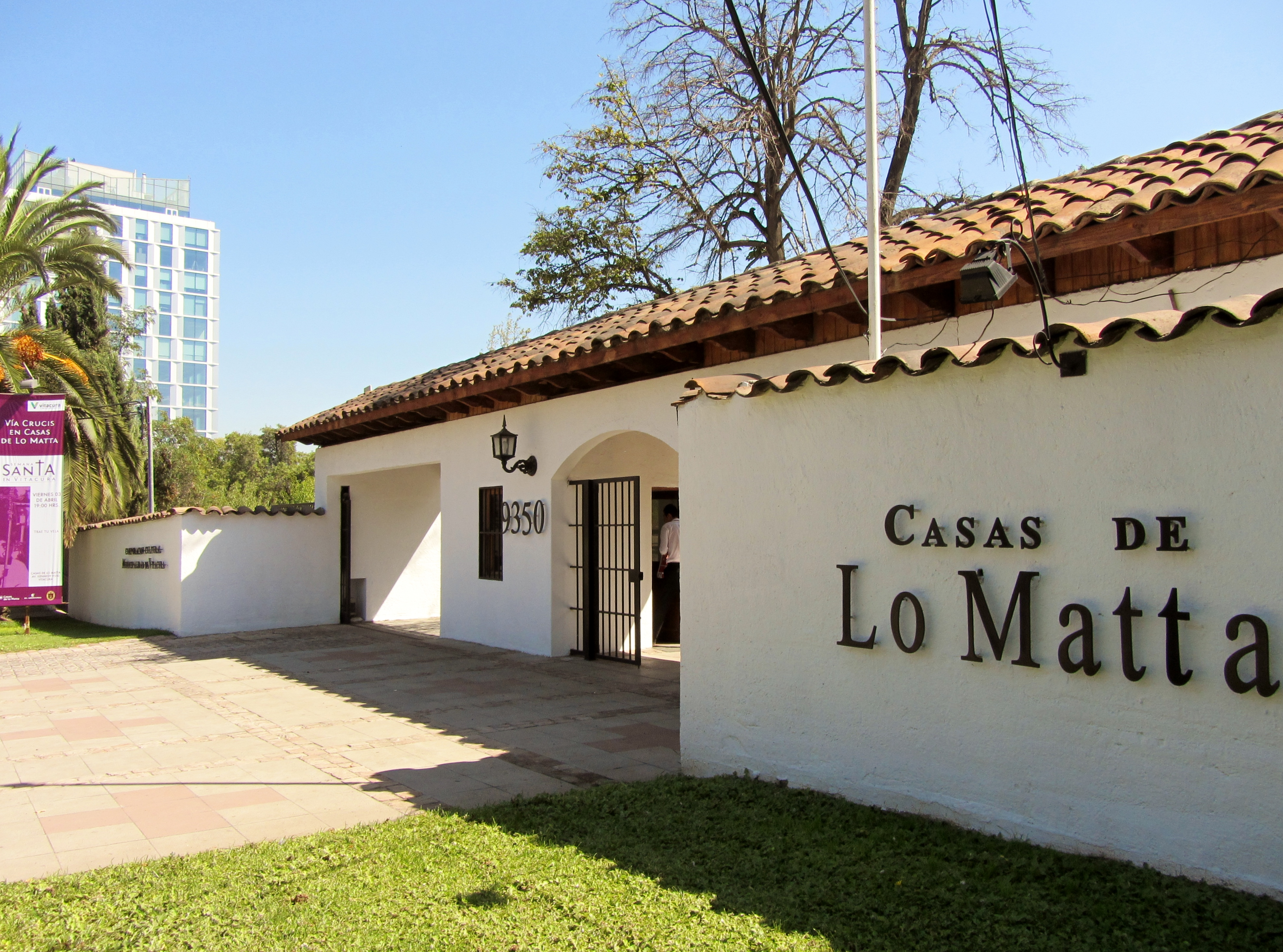 Casas de Lo Matta